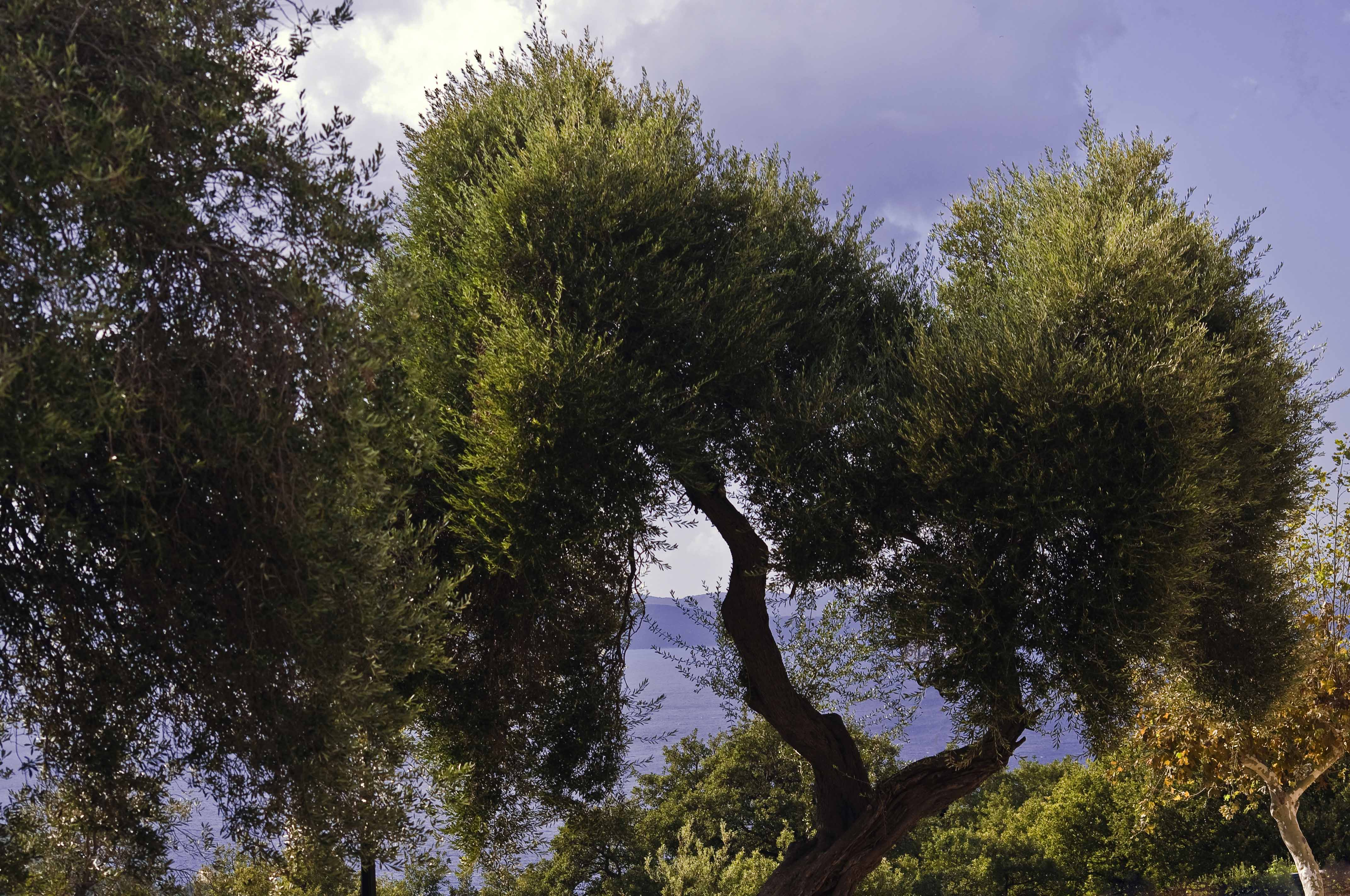 Olivier en Corse dans la lumière d'automne